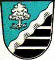 Wappen von Pullach